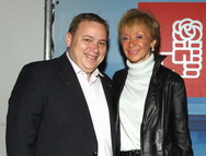 Orengo y Mª Teresa Fernández de la Vega